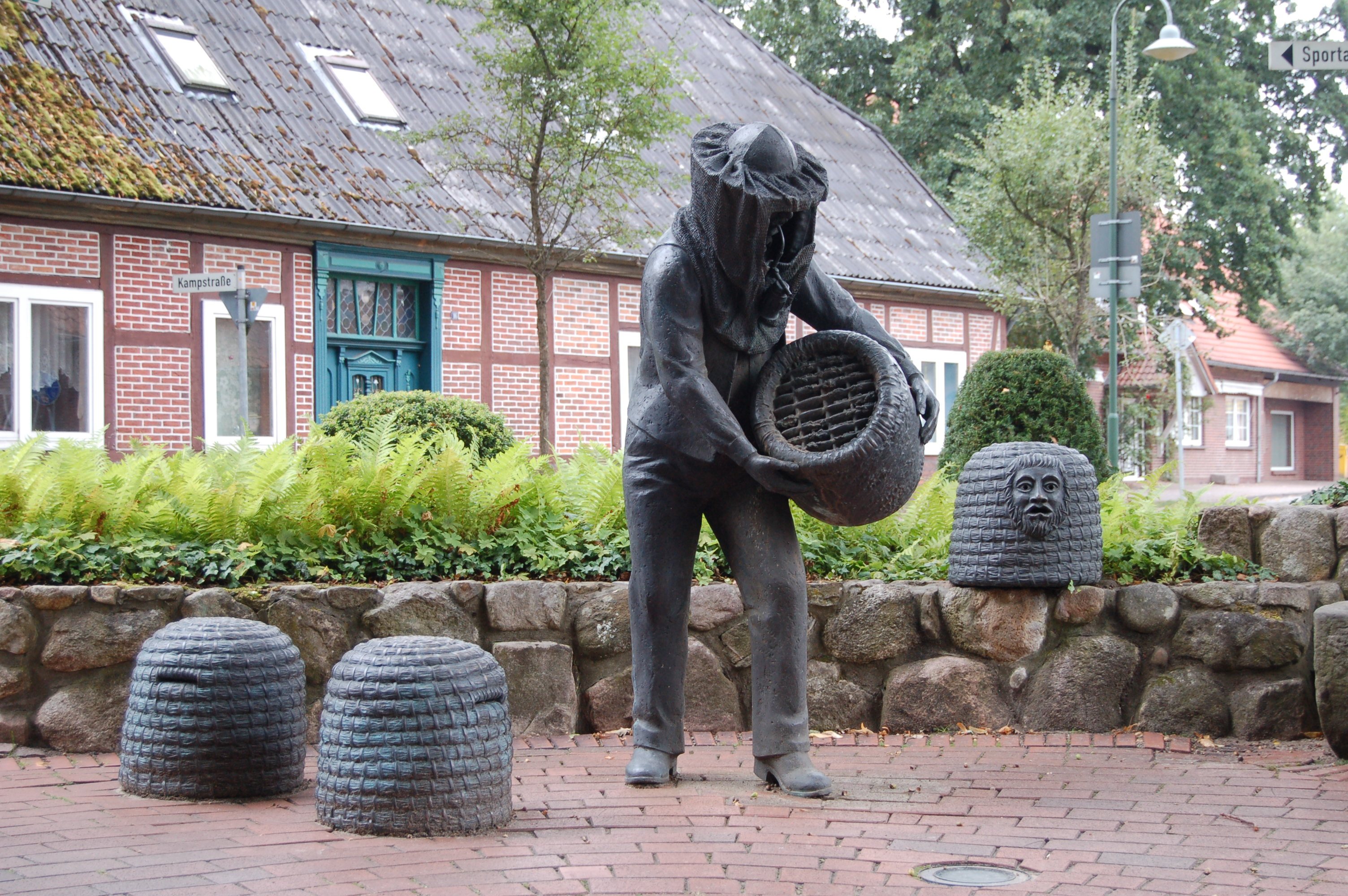 Der Wietzendorfer Imker, Figurengruppe aus Bronze, auf dem Kirchenvorplatz in Wietzendorf in Niedersachsen, Deutschland. Das Denkmal wurde 1996 von dem deutschen Bildhauer Claus Homfeld zur Erinnerung an den dort verbreiteten Berufsstand des Imkers und als Wahrzeichen des alljährlichen „Honigfestes“ geschaffen. Rechts, auf der Mauer stehend ist ein Bannkorb dargestellt.